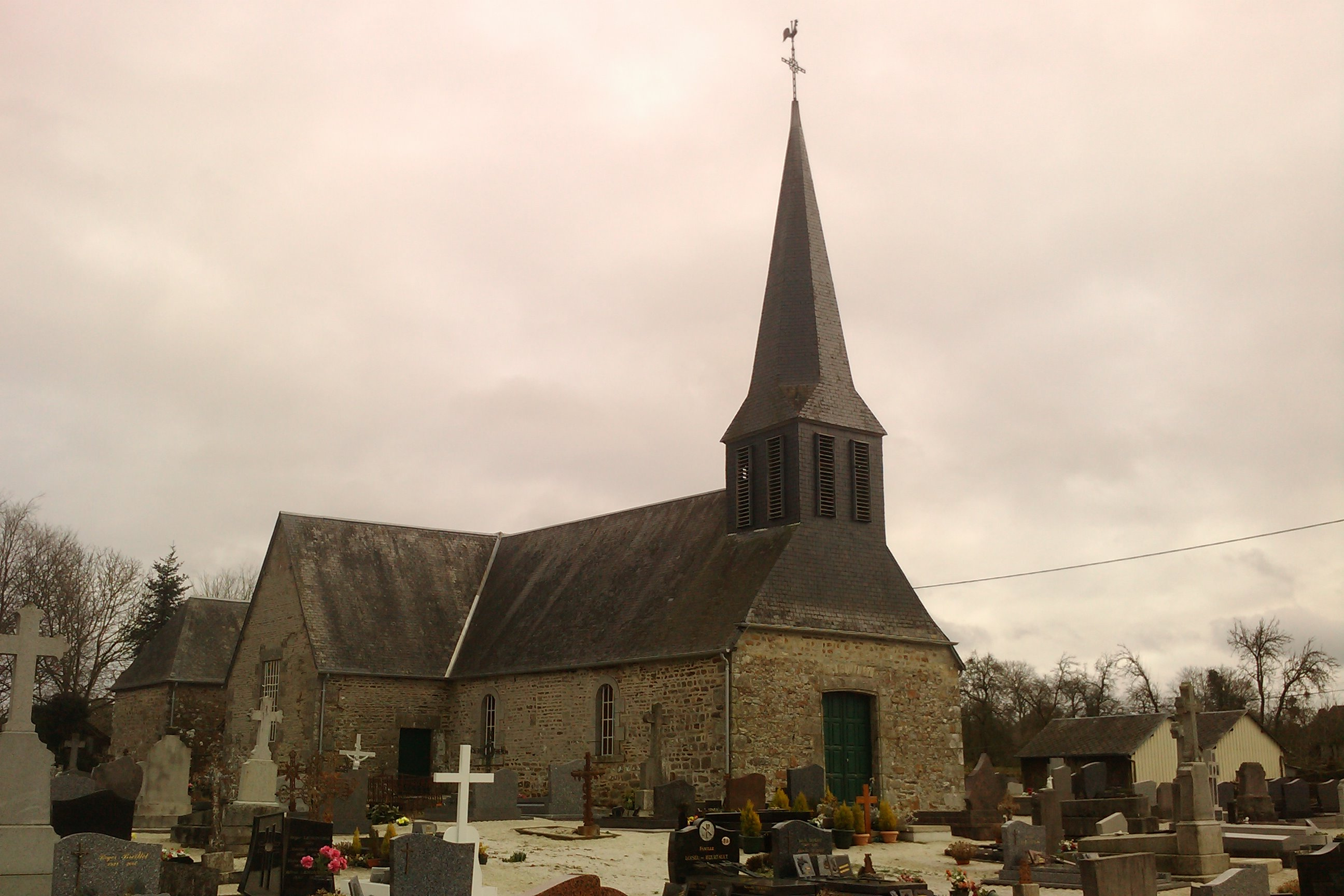 église Saint-Jean-Baptiste de Saint-Jean-du-Corail